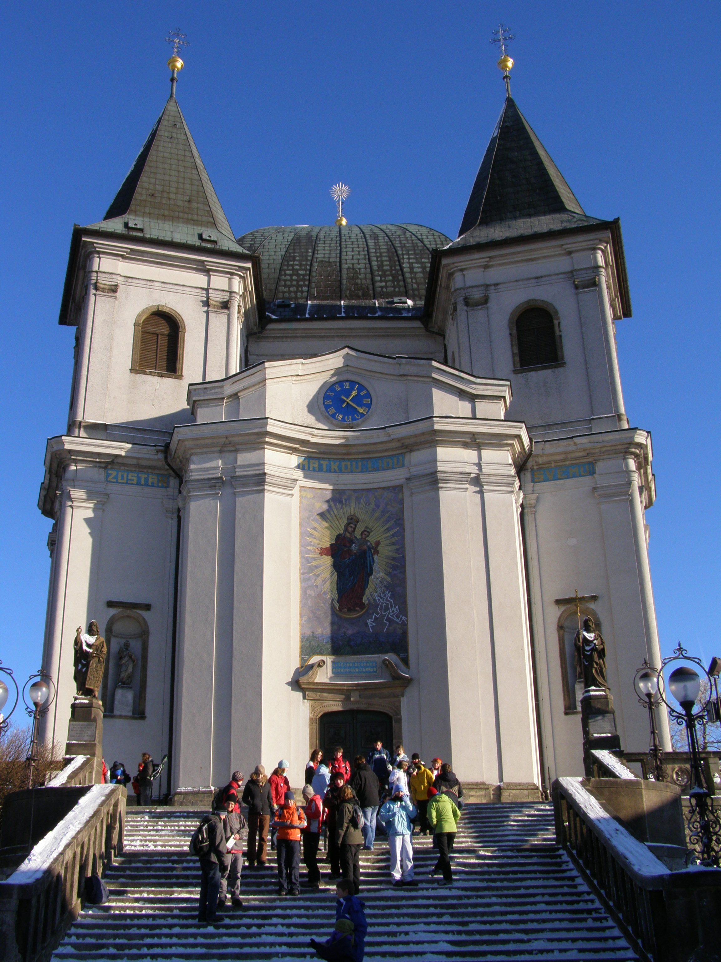 Hostýn, Bazilika Nanebevzetí Panny Marie, pohled od západu